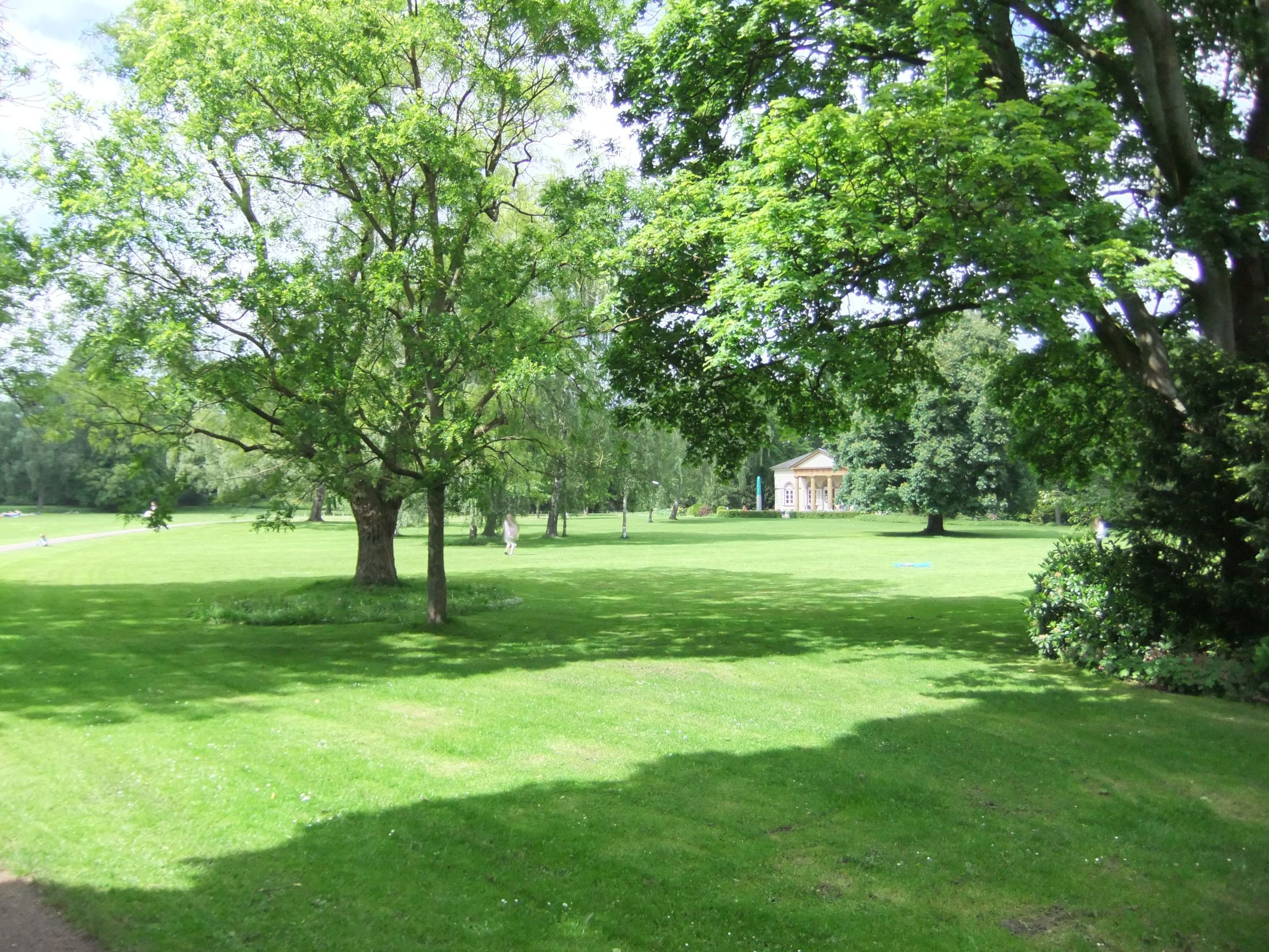 Teil des Nordparks in Bielefeld. Im Hintergrund das Gartenhaus.